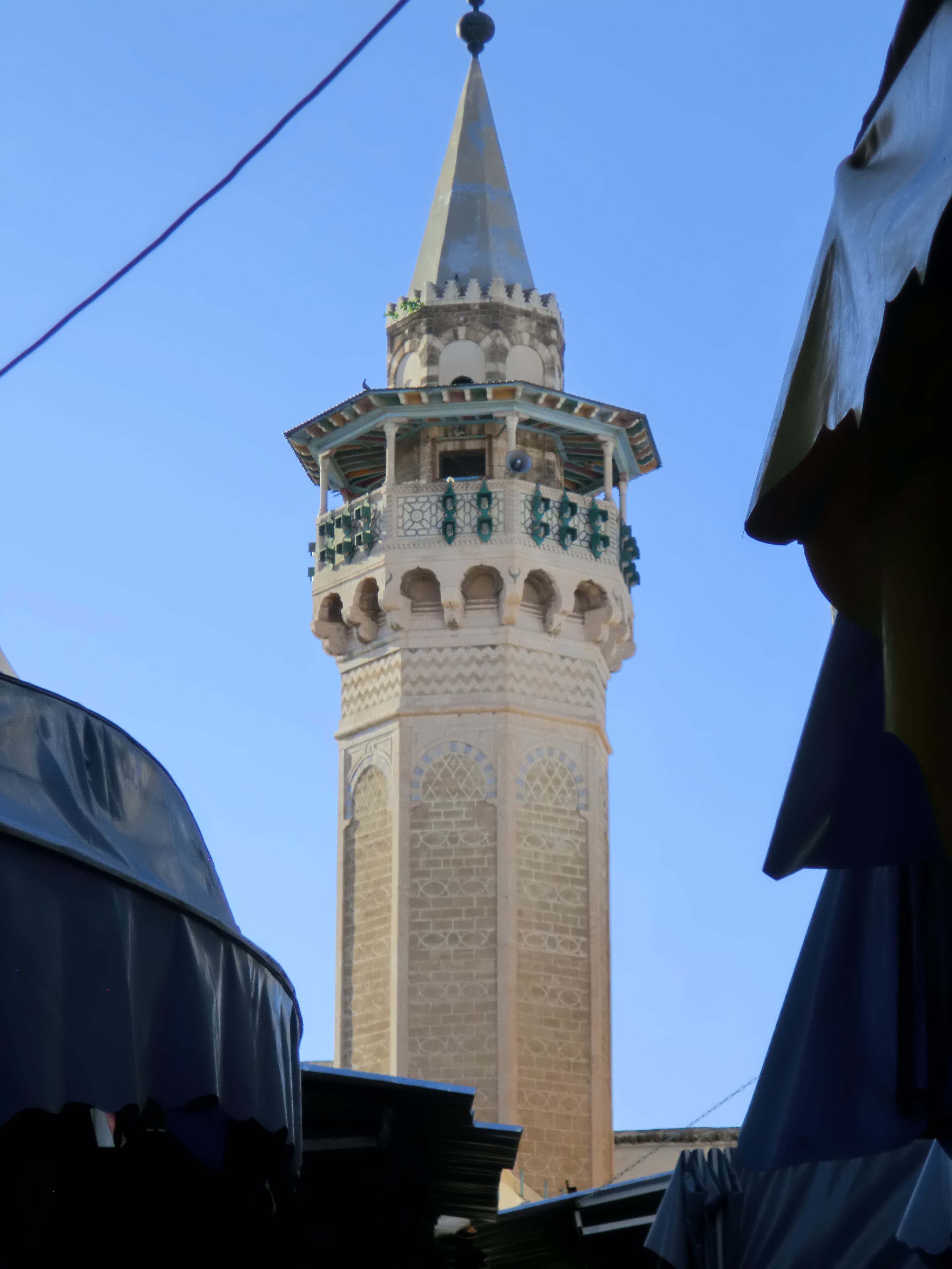 Mosquée Djamâa-Djedid, Tunis